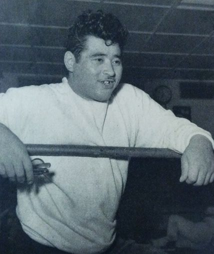 遠藤幸吉